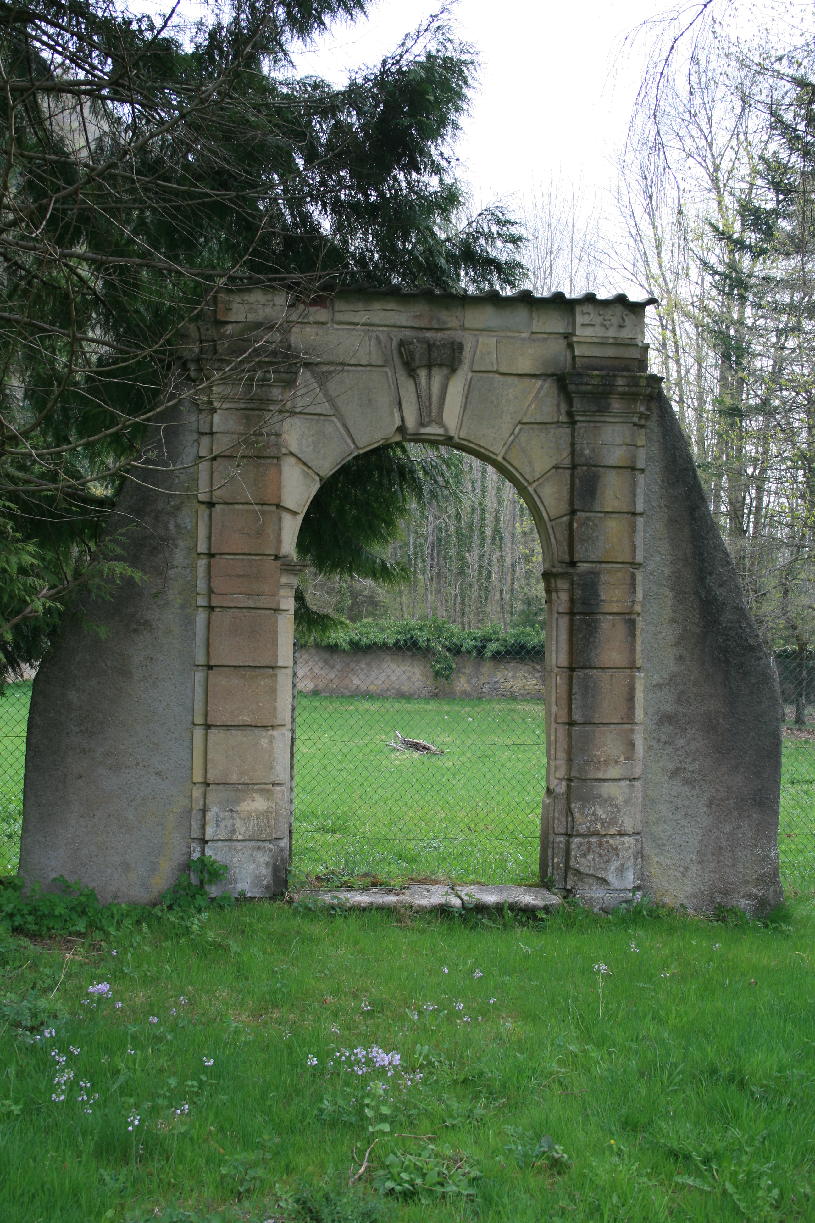 Torbogen beim Standort des ehemaligen Klosters Lützel (Lucelle, Elsass)